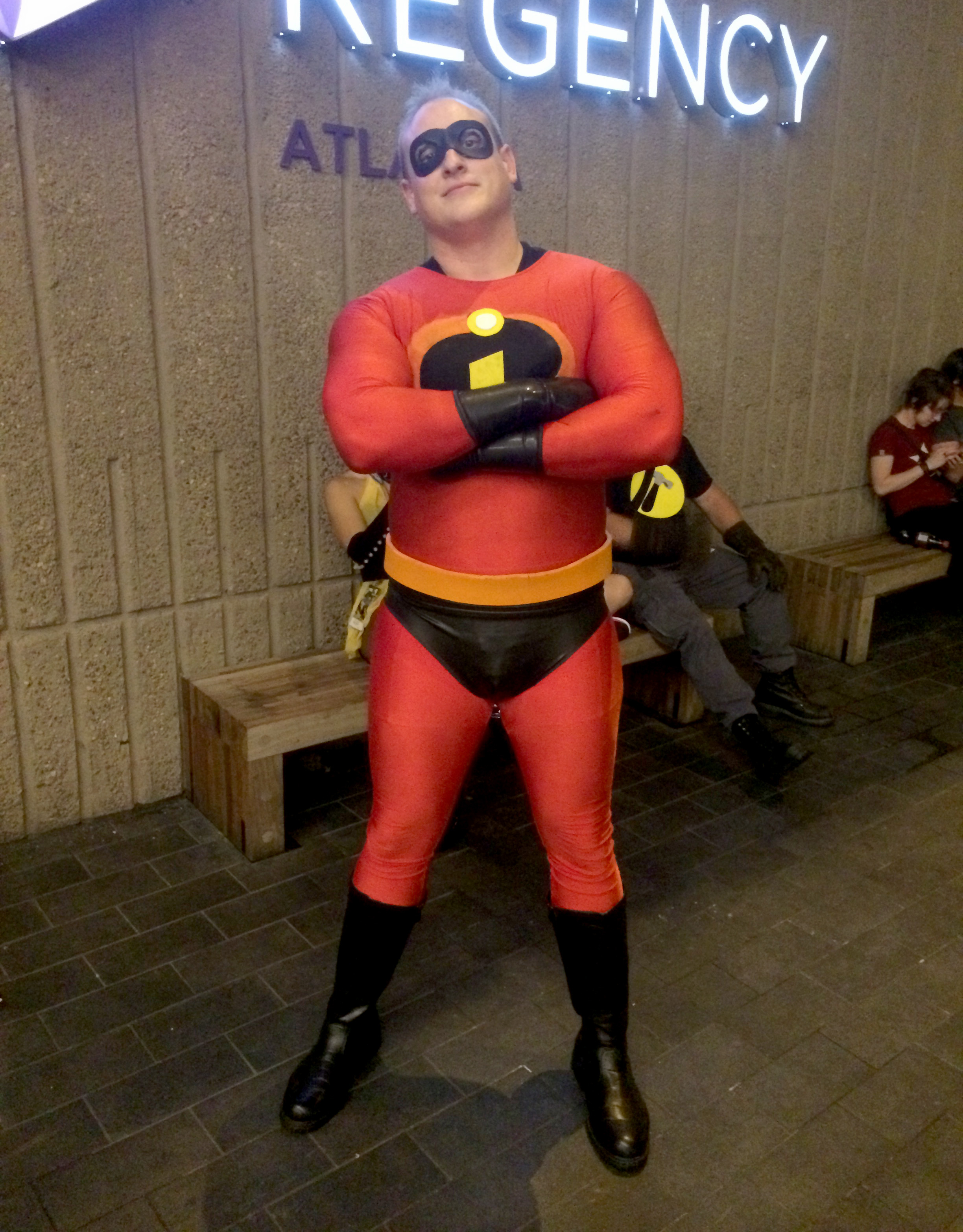 Cosplay at Dragon Con 2014.